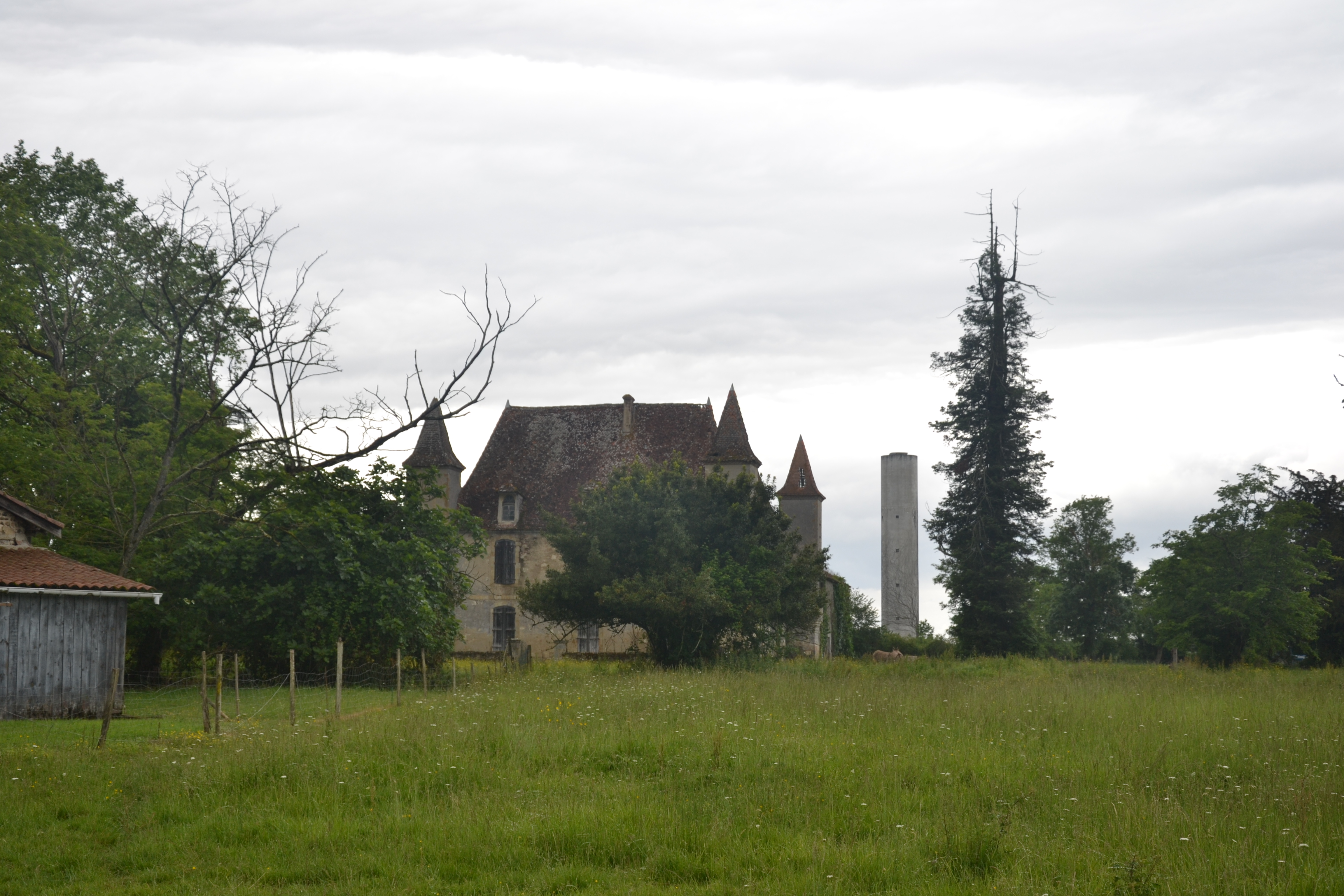 Château de Cahuzac-sur-Adour